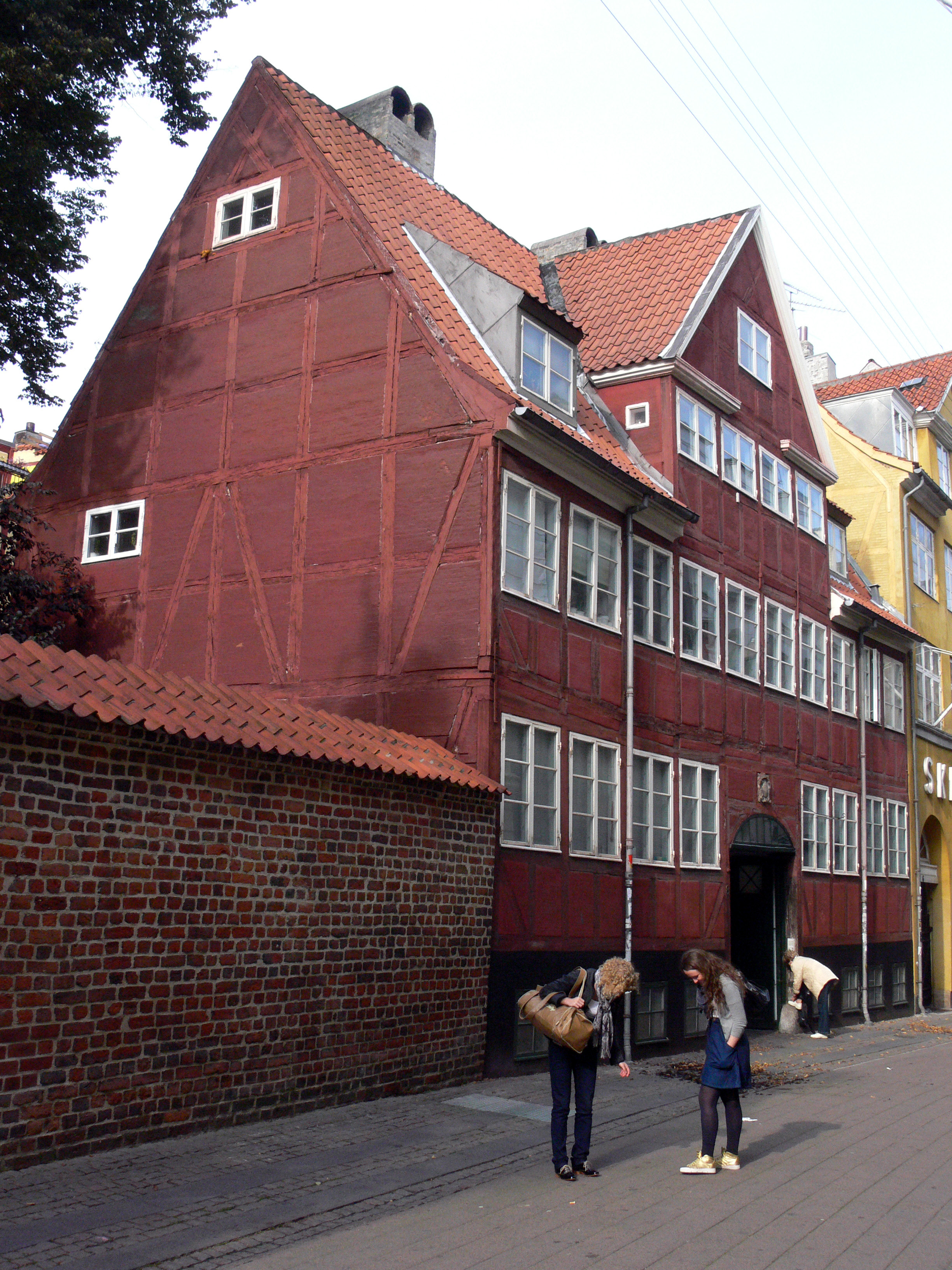 Skindergade 8 in Kopenhagen. Hier wohnte der isländische Dichter Jónas Gíslason (1800–1887)